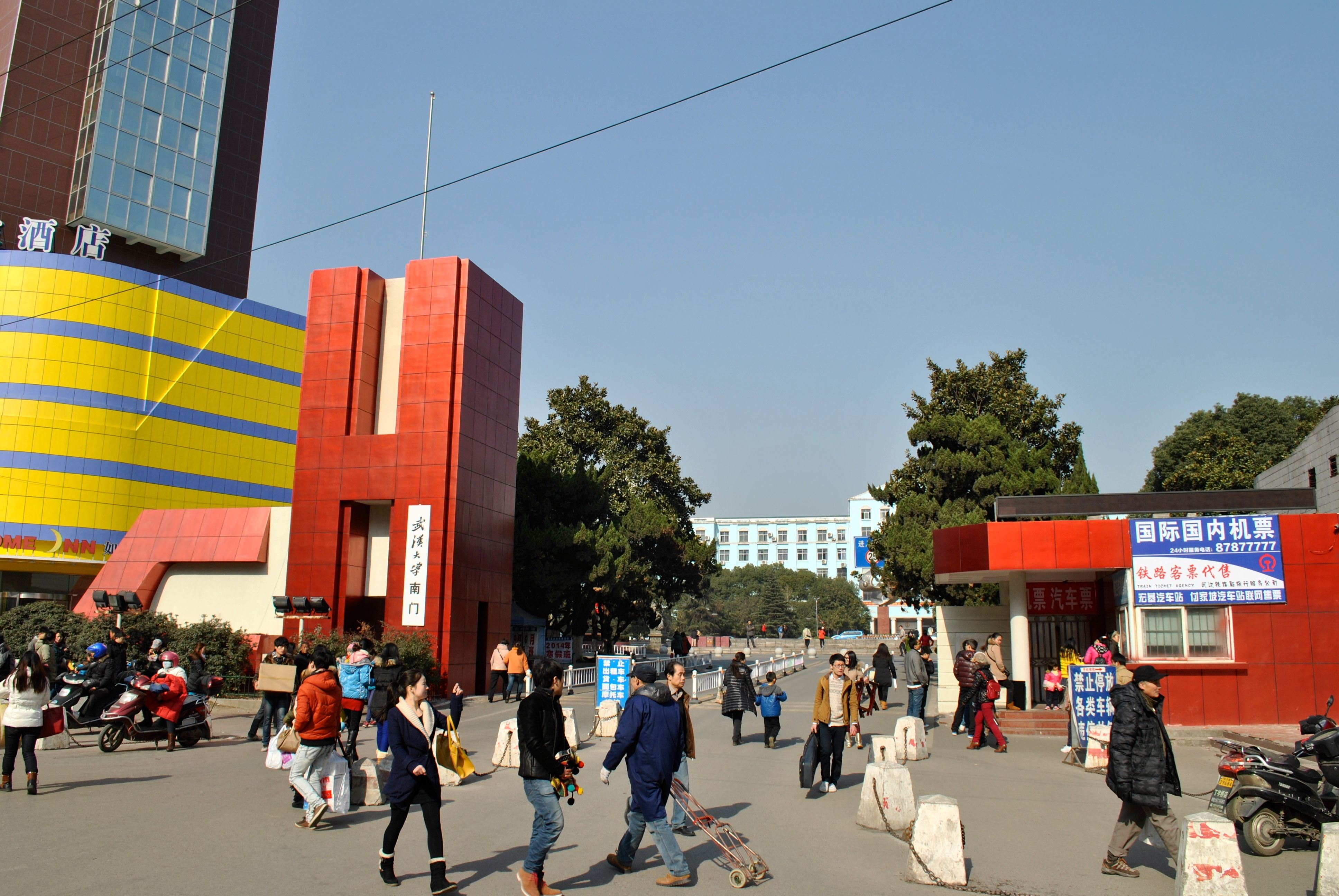 武大信息学部校门。